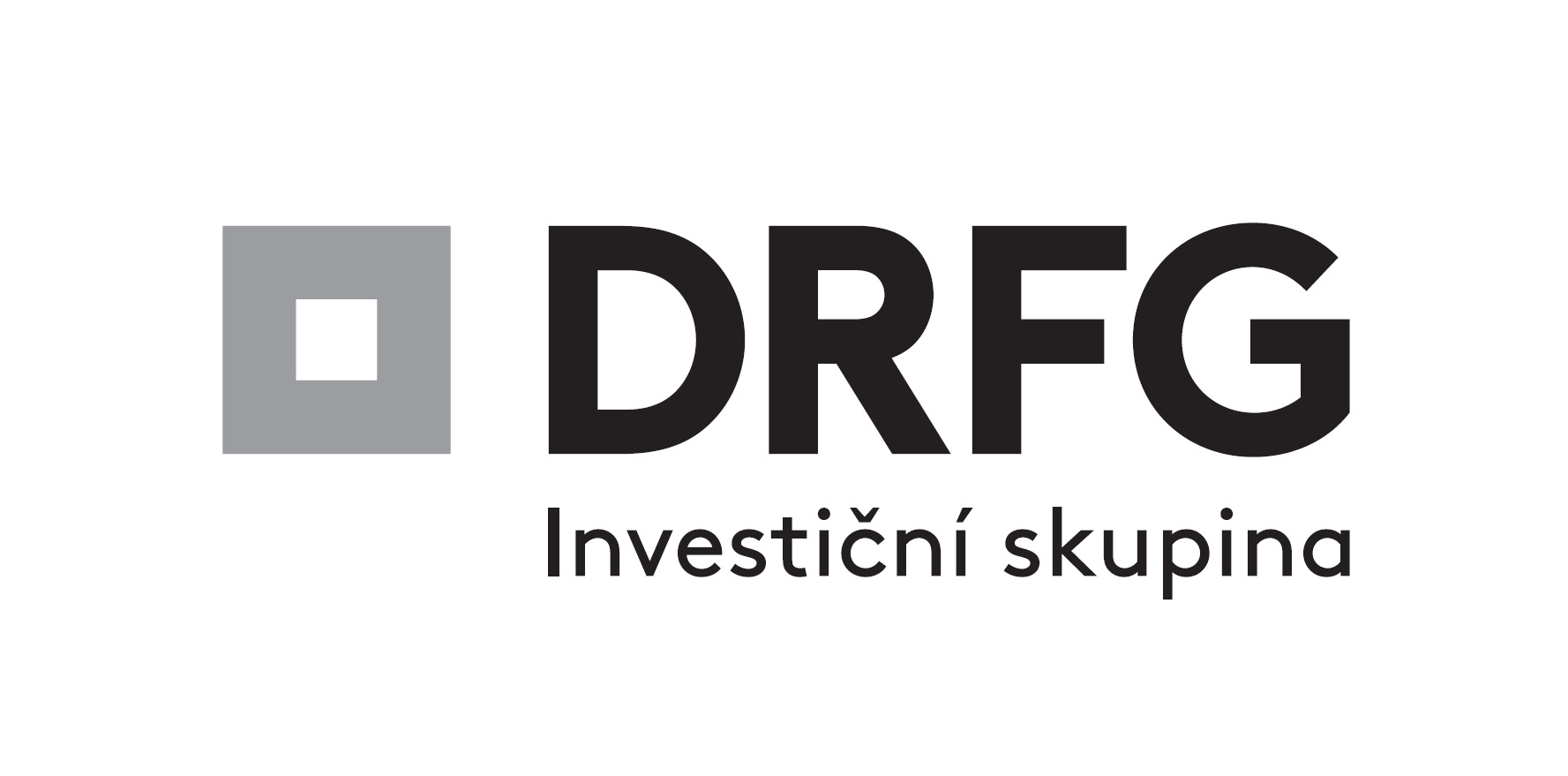 Logo DRFG